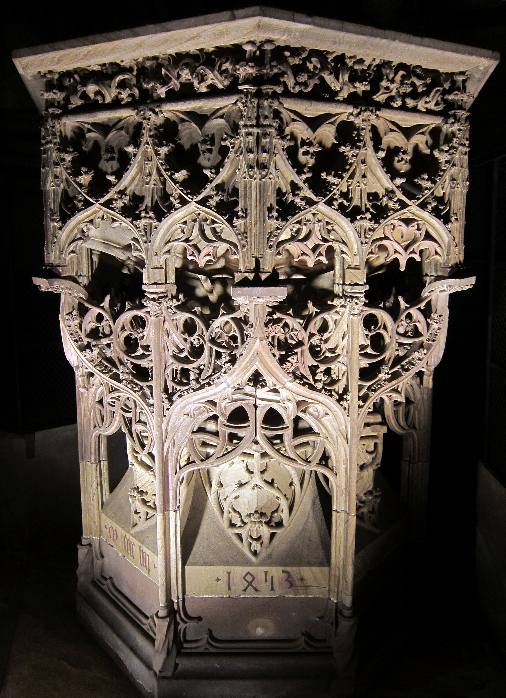 Les fonds baptismaux de la Cathédrale Notre-Dame de Strasbourg, par Jodok Dotzinger, 1453.